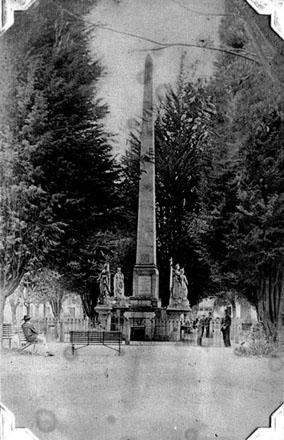 La Huerta de Jaime (actual monumento a Los Mártires) en 1889